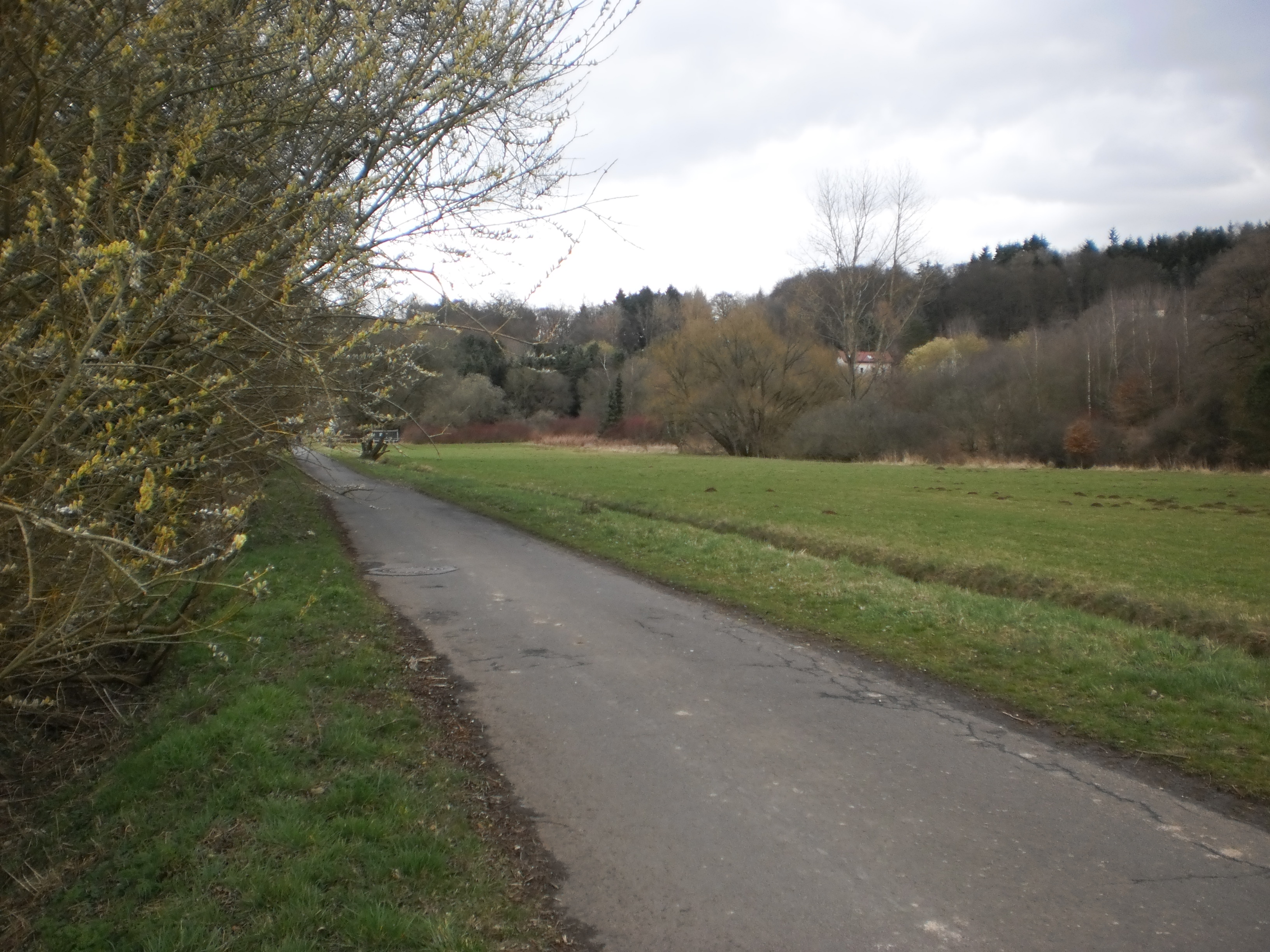 Asphaltierter Weg zwischen Marburg-Cyriaxweimar und dem Stadtteil Stadtwald (eine Radroute) mit einem Weidengebüsch am Wegrand und dem hier schmalen Graben des Cyriaxweimarer Bachs rechts daneben, Mitte März 2017. Einige Häuser am Talrand im Hang aufwärts zum Stadtwald weiter südöstlich.